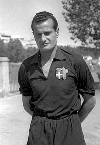 calciatore italiano